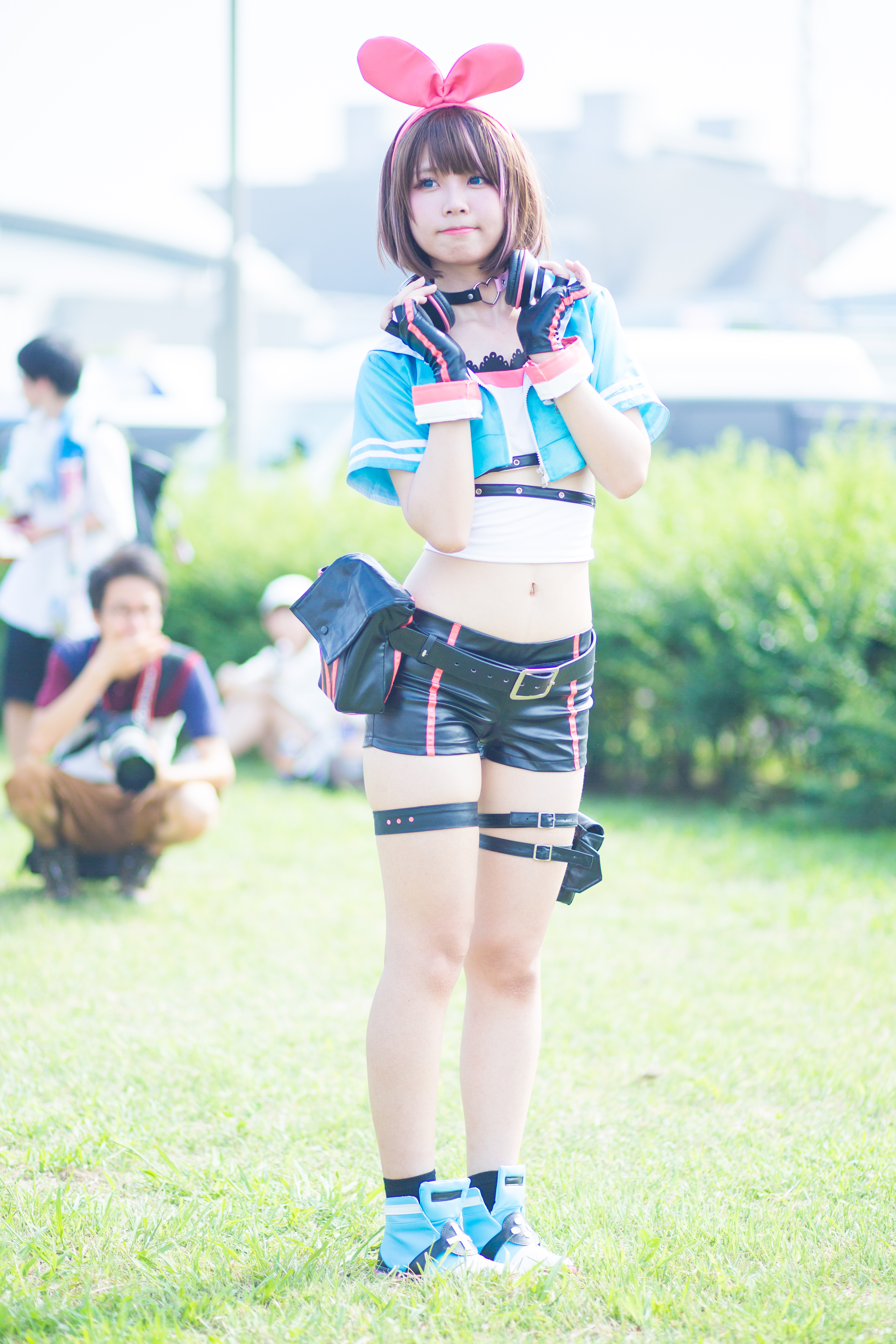 コミックマーケット94 3日目 コスプレイヤー